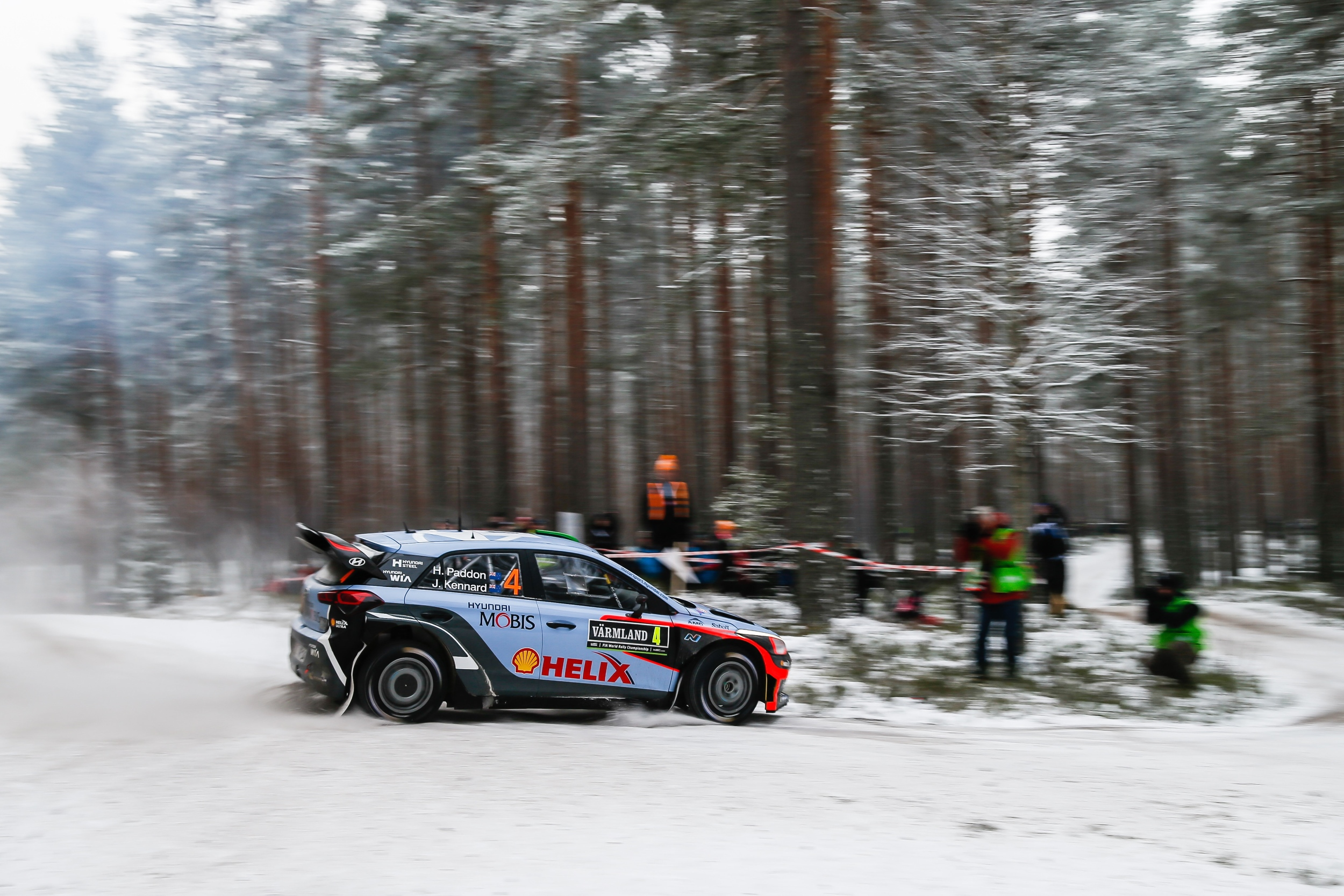 Hayden Paddon podczas Rajdu Szwecji 2017